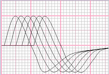 normal. Dekrement, vereinfacht